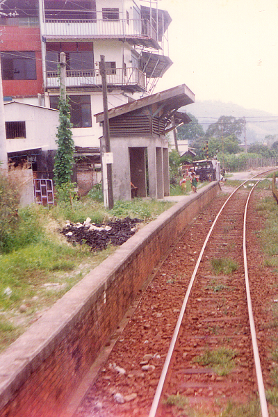 台鐵東勢線梅子車站。